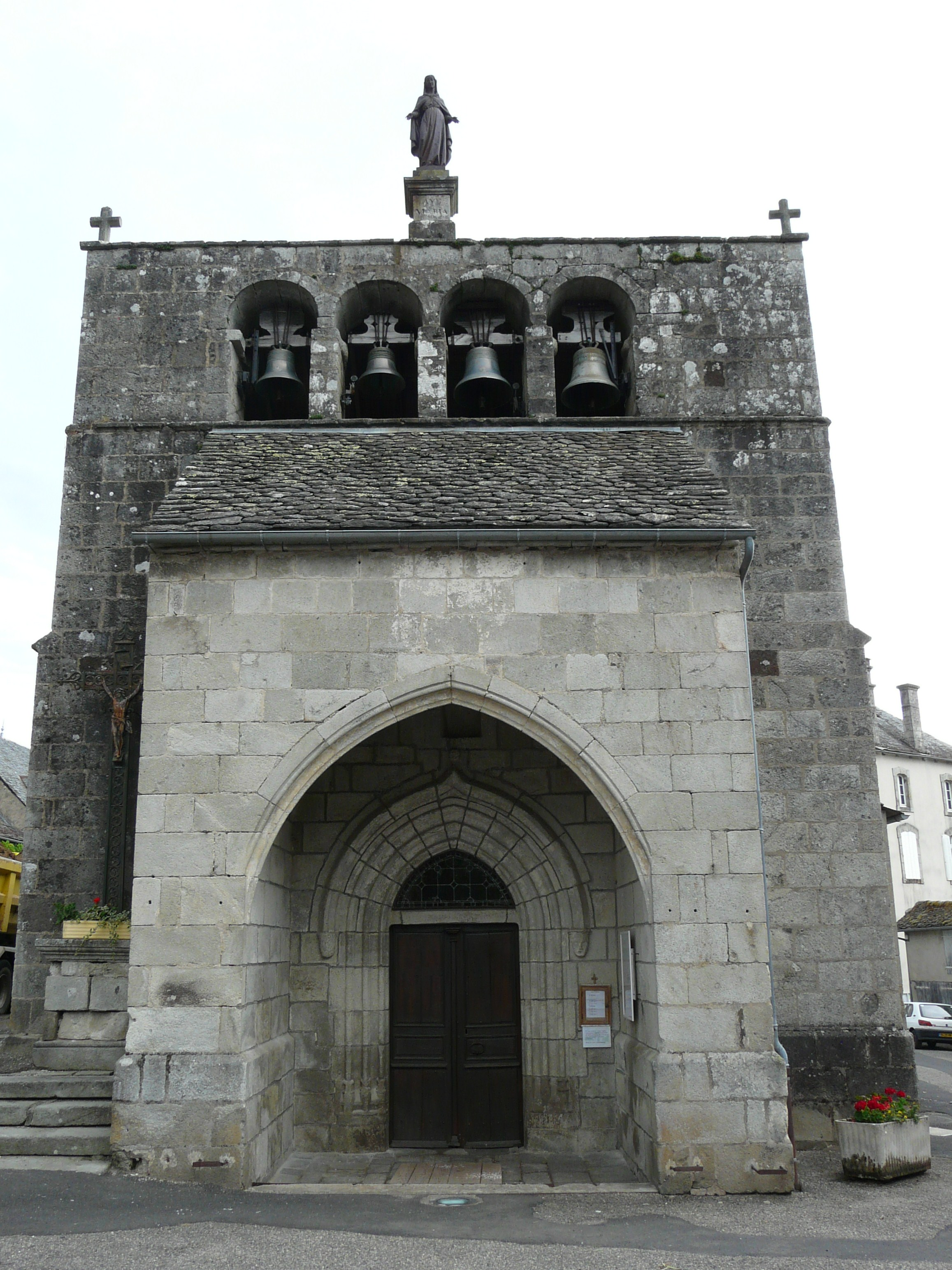 La façade occidentale de l'église Saint-Étienne-et-Saint-Clair, Saint-Étienne-de-Chomeil, Cantal, France.